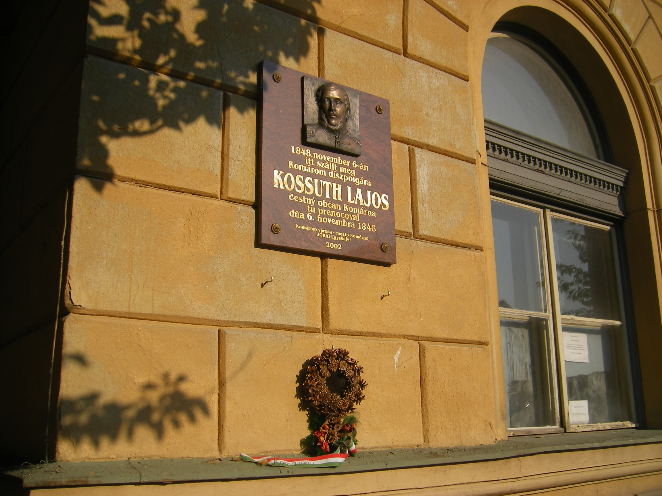 Komárom - Kossuth Lajos emléktáblája a Klapka-téren